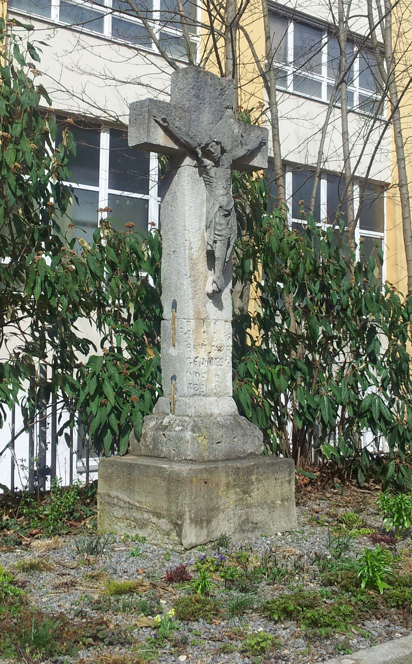 Das Zantkreuz in Regensburg-Kumpfmühl in einer Gesamtansicht.